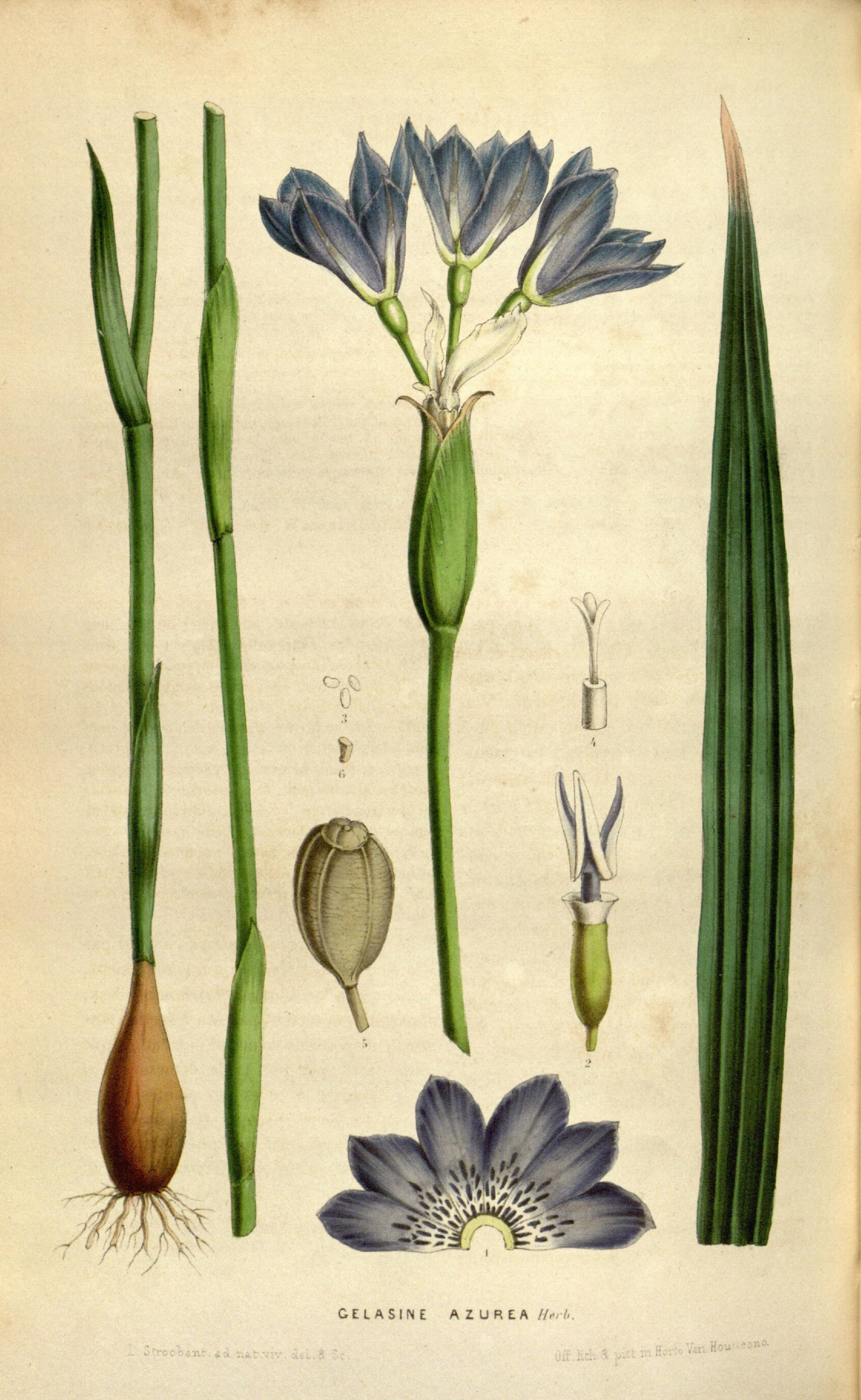 Flore des serres et des jardins de l'Europe :ou descriptions et figures des plantes les plus rares et les plus meÌ ritantes, nouvellement introduites sur le continent ou en Angleterre ...